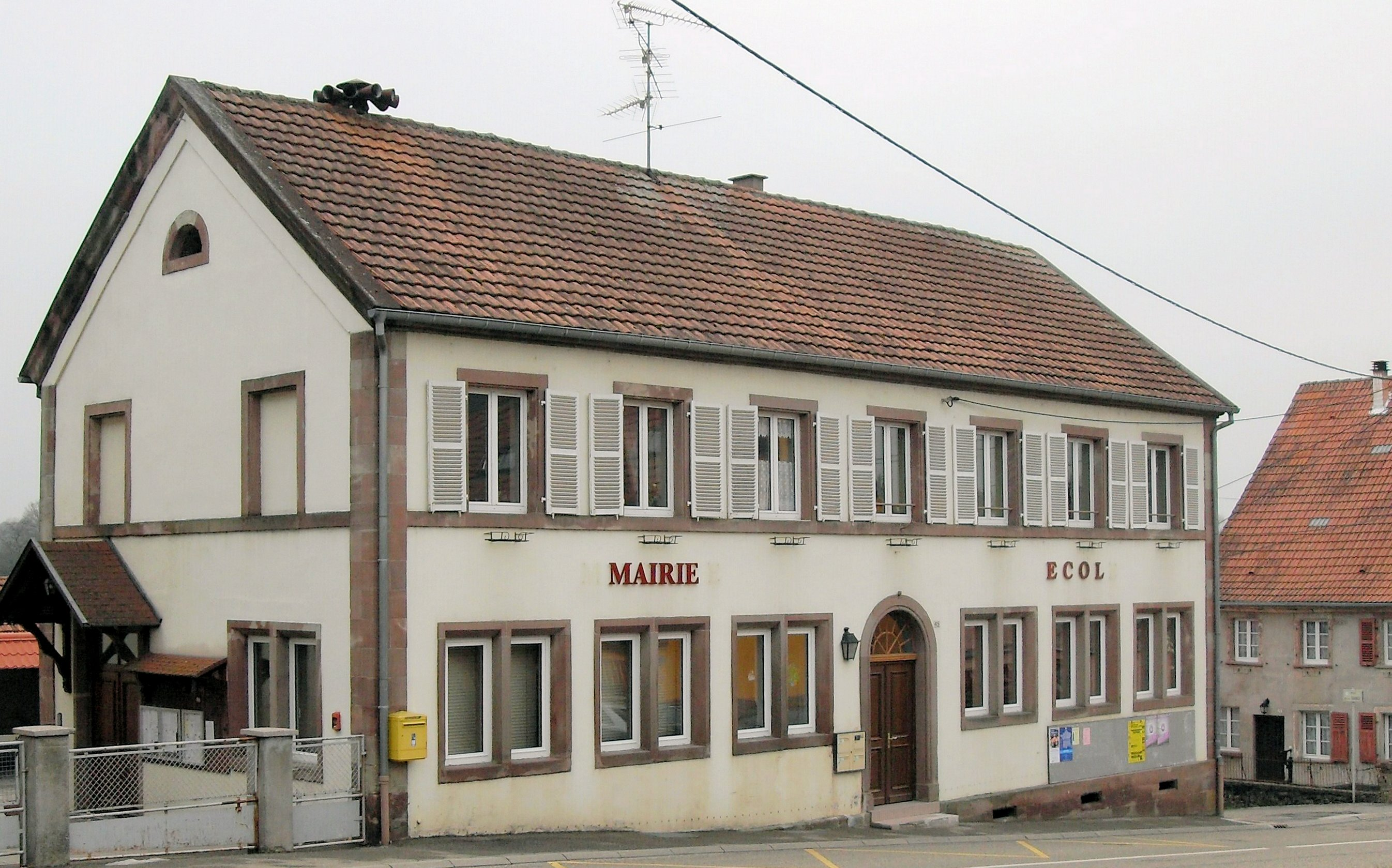 La mairie et l'école de Siewiller